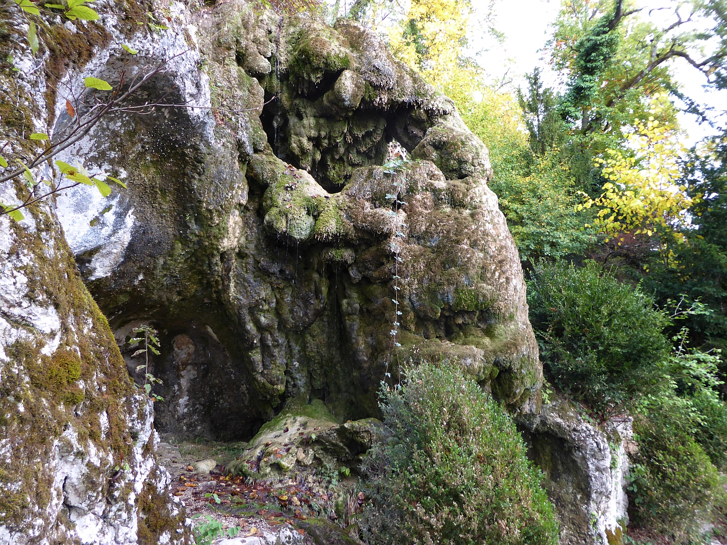 Nach dem Tod des Idyllendichters, Malers, Zeichners, Politikers und Verlegers (Begründer der NZZ 1780) Salomon Gessner wurde die Grotte umgestaltet zur Gessnergrotte.